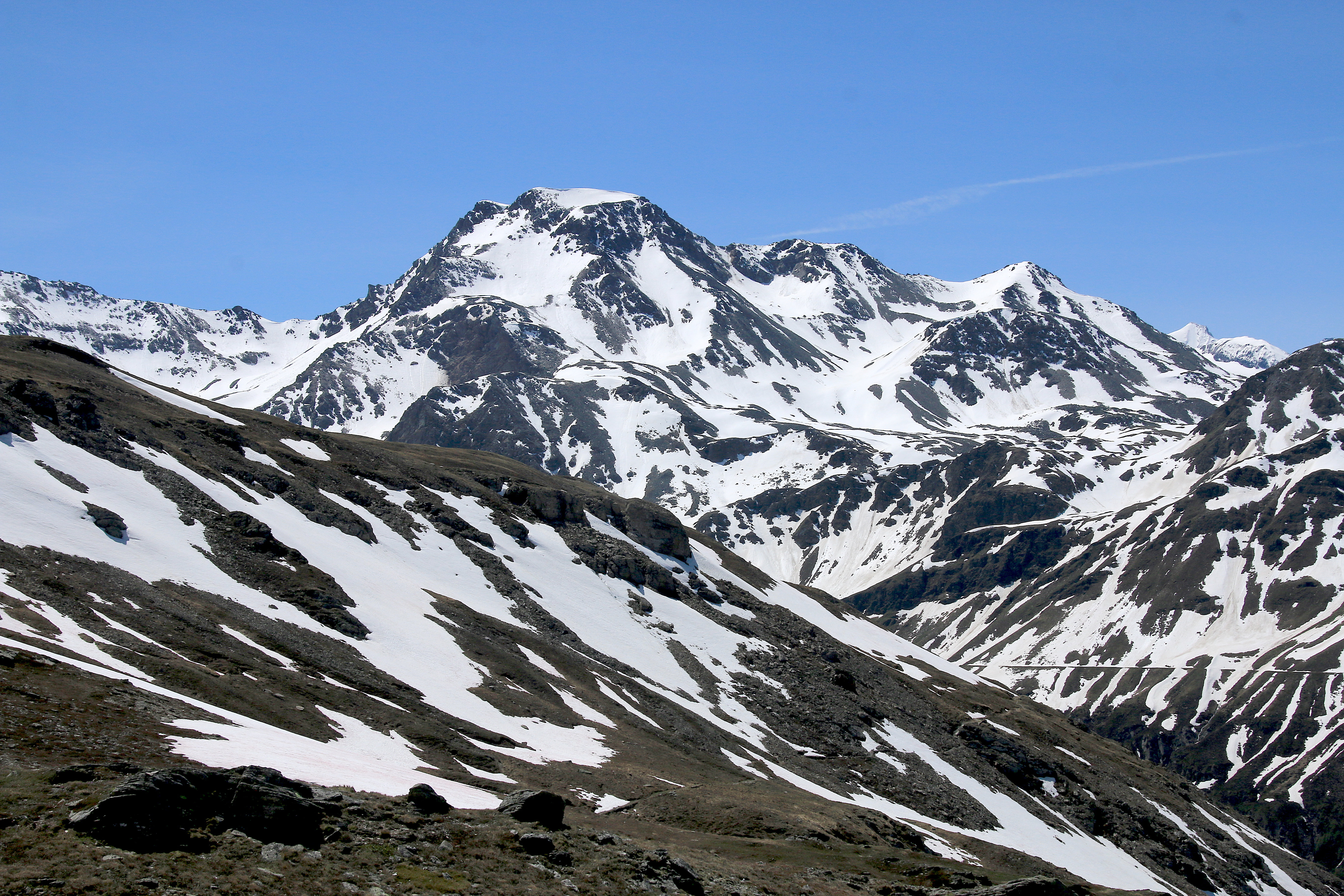 Mattwaldhorn vom Bistinenpass aus gesehen